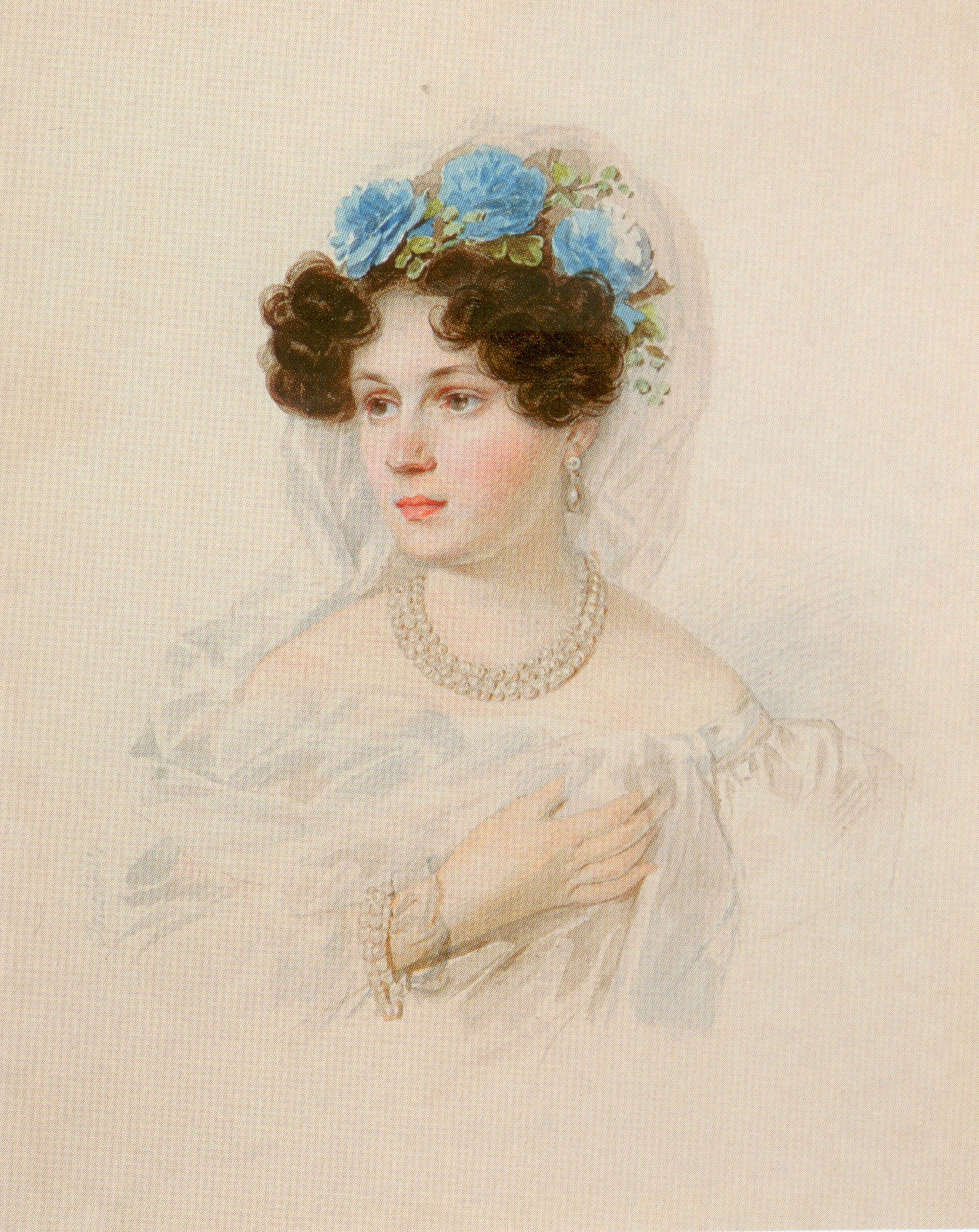 Княгиня Аделаида Павловна Голицына (1799-1882), ур.Строганова